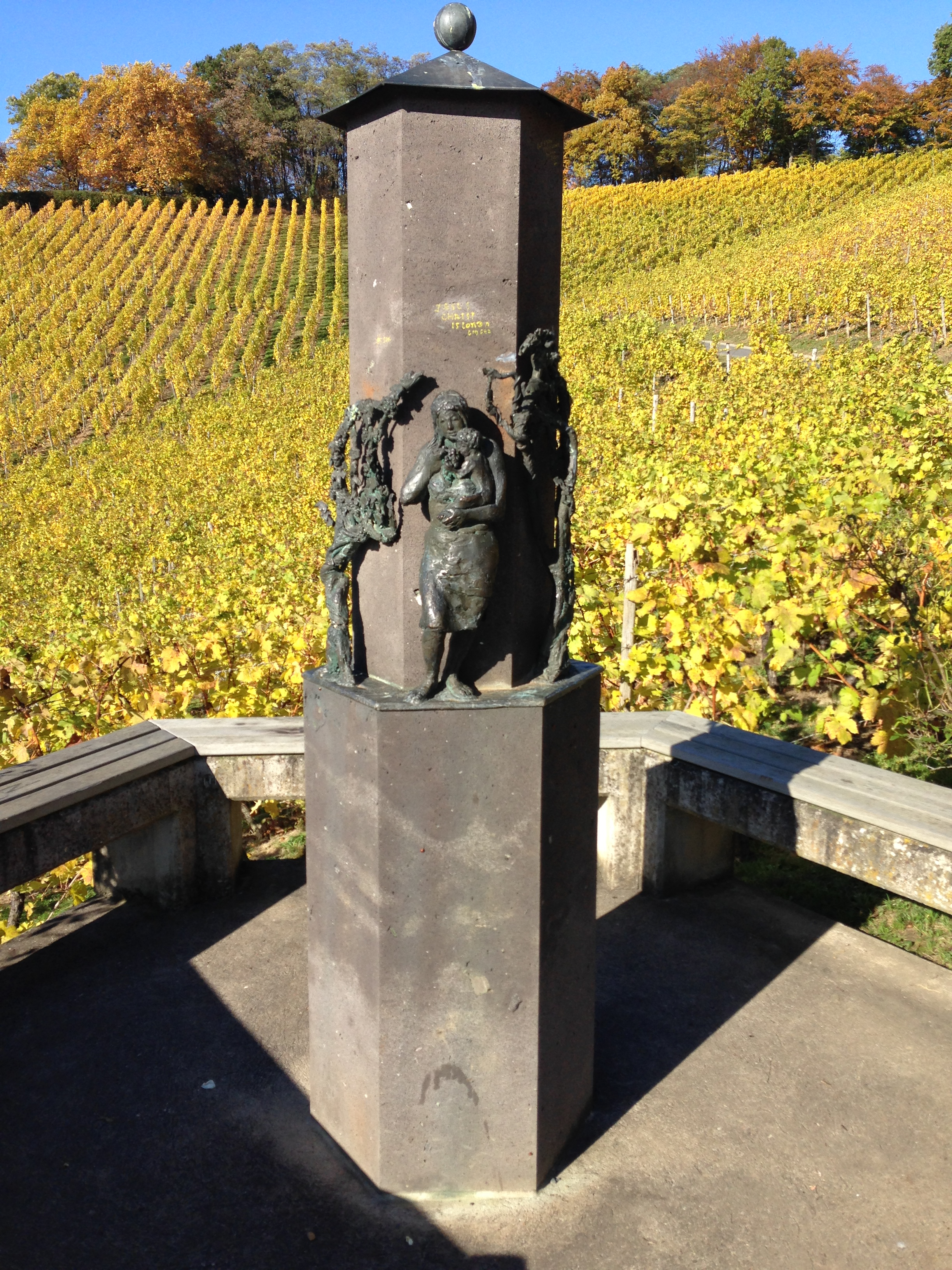 Mariensäule (2000) von Ernemann Sander im Weinberg Oberdollendorf